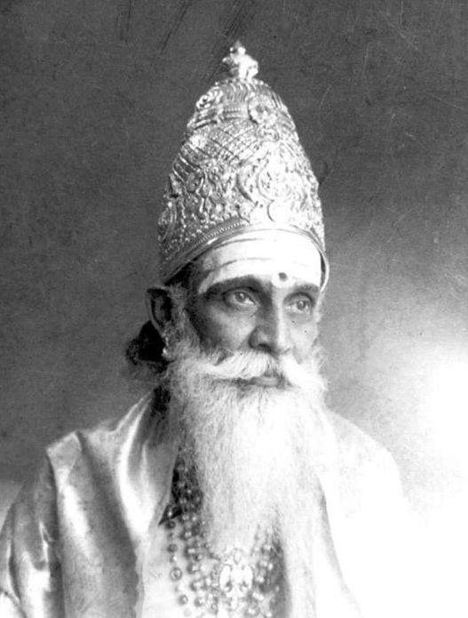 ಕನ್ನಡ: ಮೈಸೂರು ರಾಜ್ಯದ ರಾಜ್ಯ ಗುರು